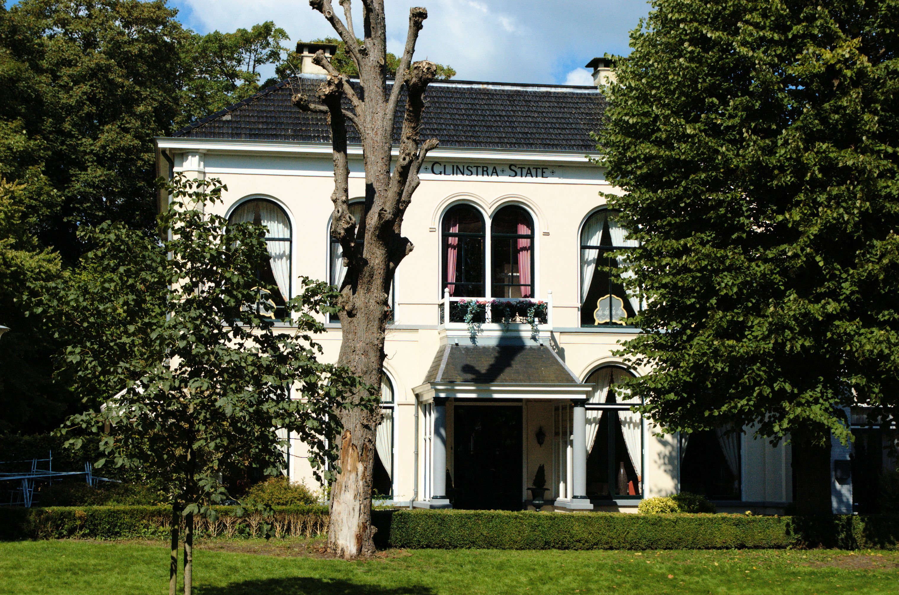 Glinstra-State in Burgum